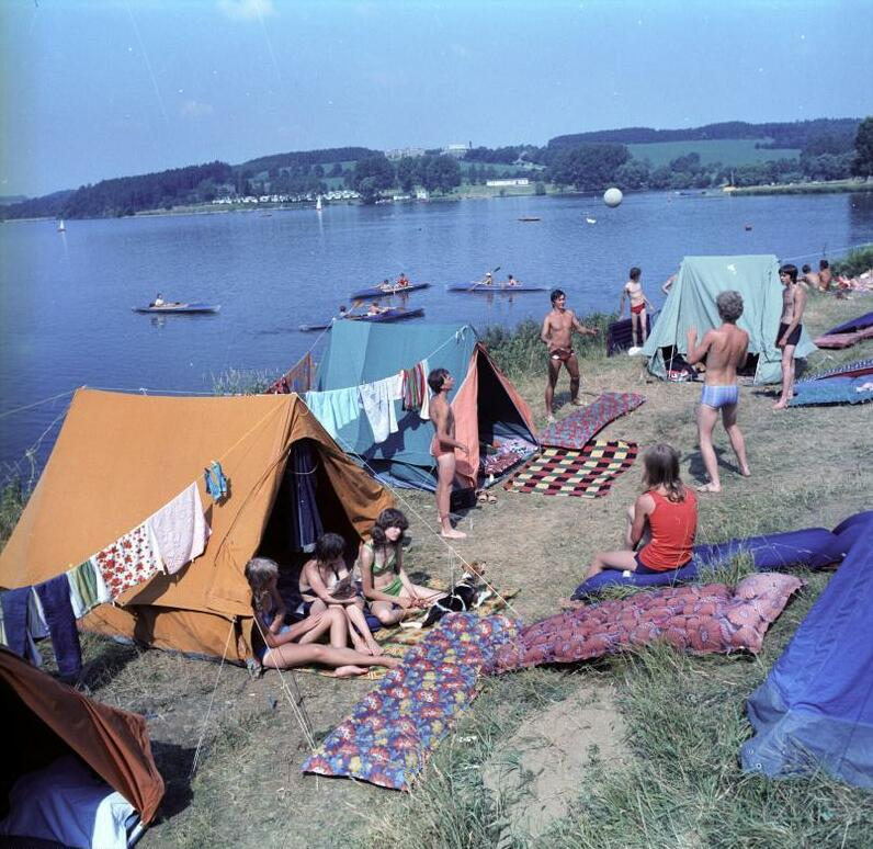 ADN-ZB/Thieme/ 30.7.82/Bez.Karl-Marx-Stadt/ Schöne DDR Ein Urlauberparadies des Vogtlandes ist die 152 ha große Talsperre Pirk, an der sich jährlich 120.000 Urlauber tummeln. Rund um den Stusee gibt es sechs Zeltplätze. Hier erholen sich Jugendliche aus dem Kreis Auerbach.